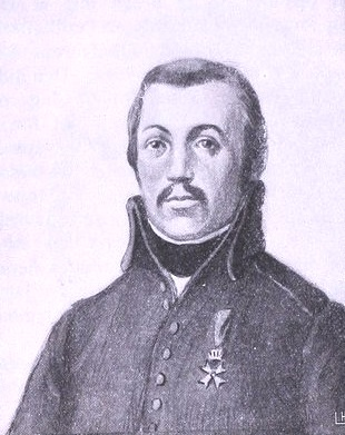 Johan Fredrik Eek